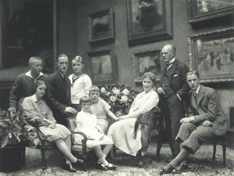 Gustav und Bertha Krupp von Bohlen und Halbach mit ihren Kindern. Von links: Berthold, Irmgard, Alfried, Harald, Waldtraut, Eckbert, Bertha, Gustav und Claus.